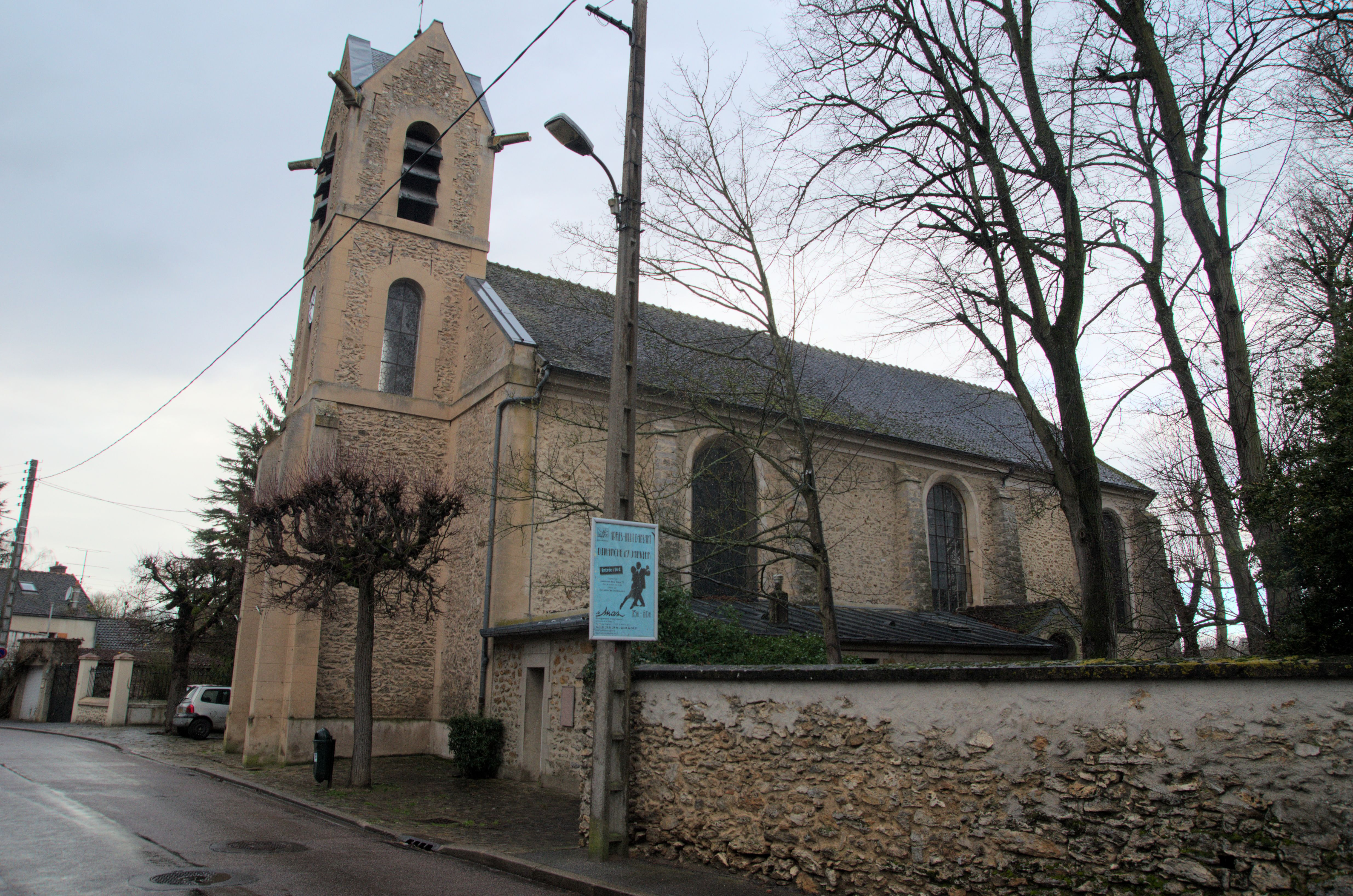 Église Notre-Dame-de-la-Nativité, rue de l’Église, au Mée-sur-Seine, Seine-et-Marne, France.